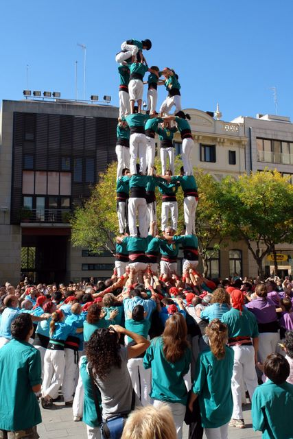 5 de 7 carregat pels Castellers de Sabadell en la XV Diada dels Saballuts.